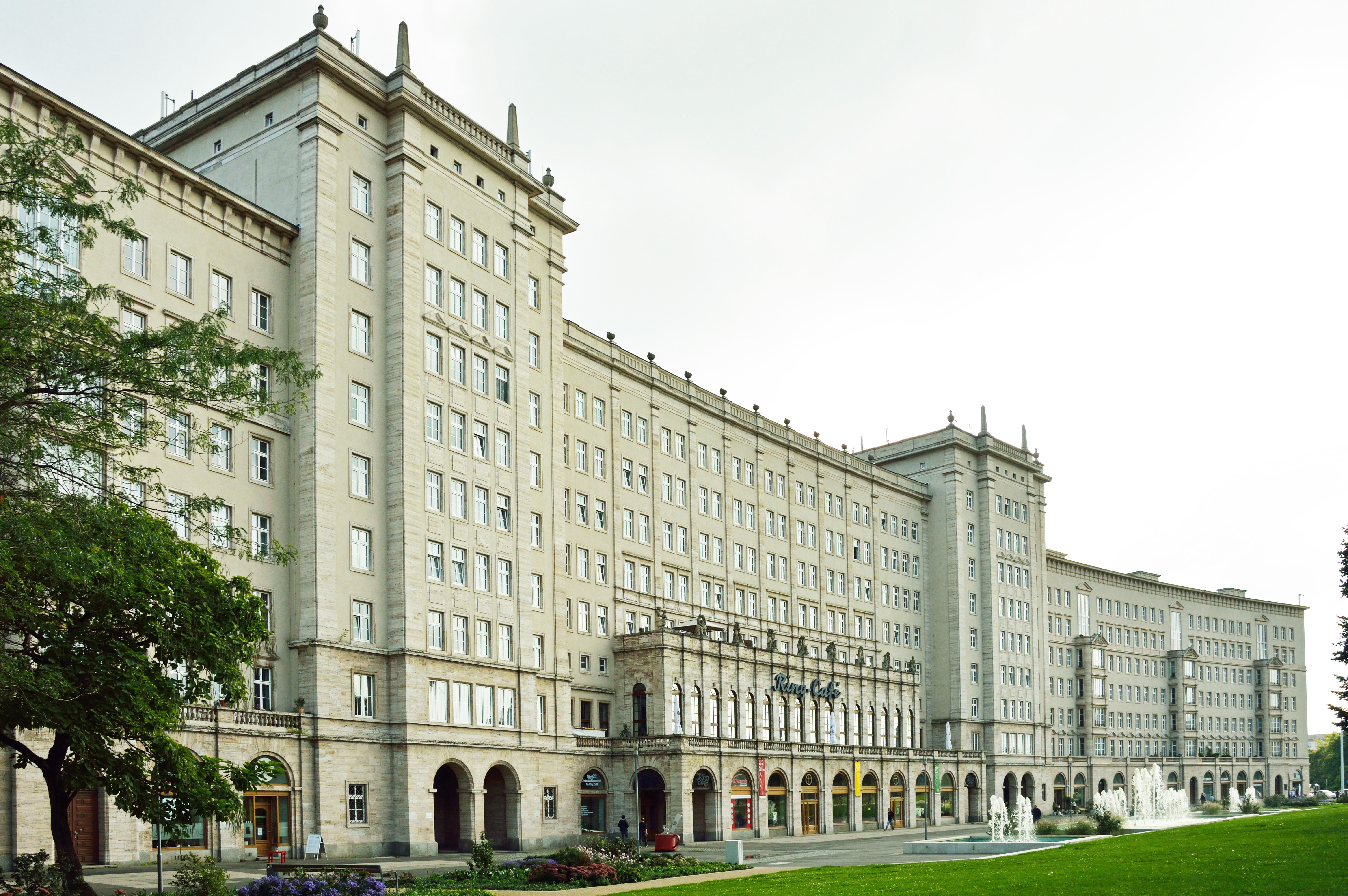 Ringcafé Leipzig Außenansicht